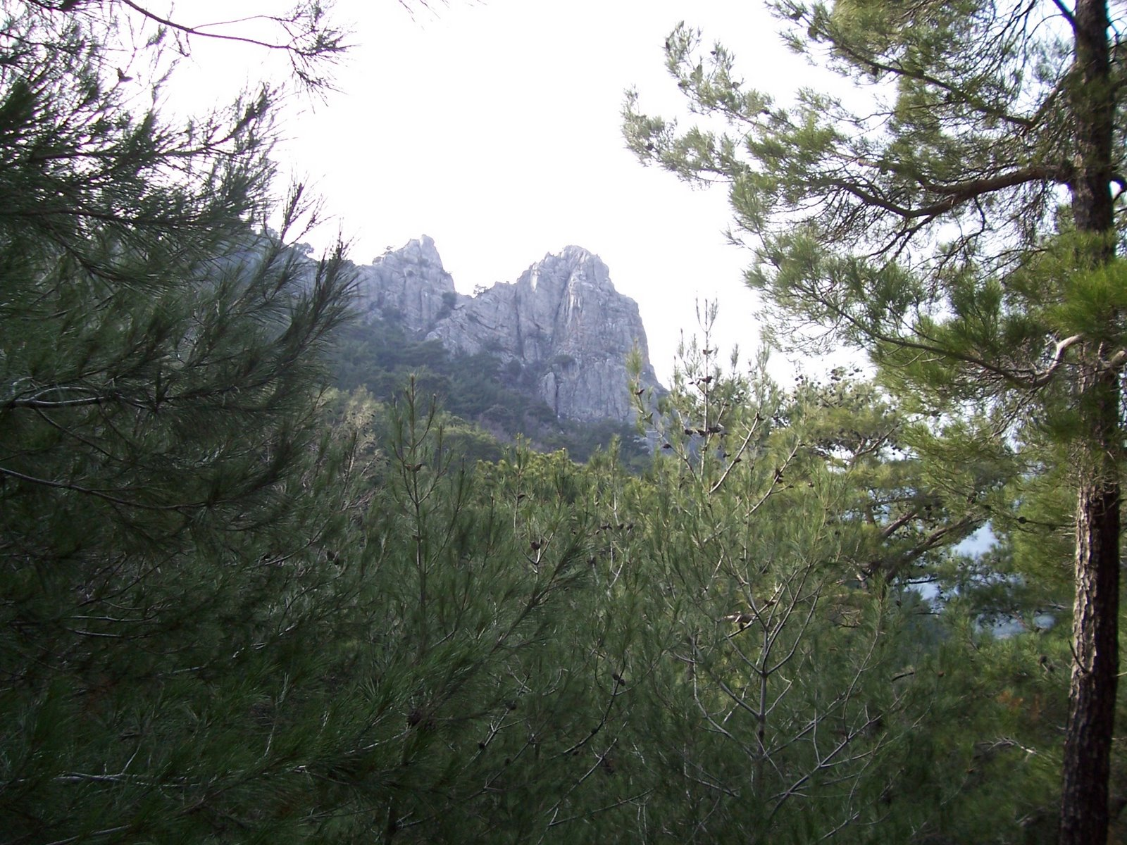 Summits in Mount Yamanlar in İzmir, Turkey